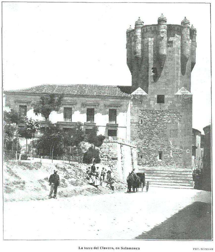 La Torre del Clavero, fotografiada por Venancio Gombau Santos, recogida en las páginas de la revista La Esfera.